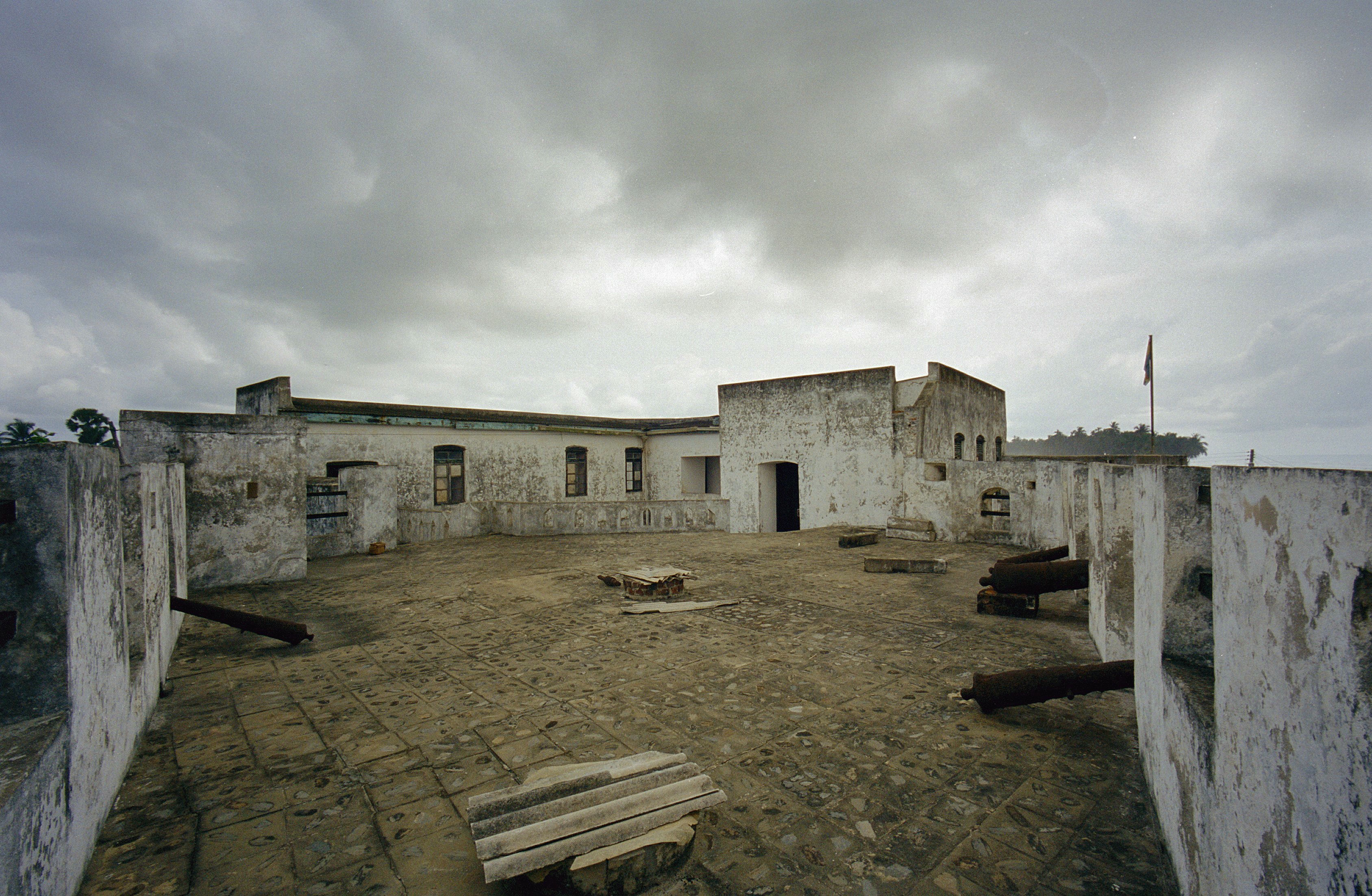 Fort Apollonia: Overzicht bovenop het bastion (opmerking: Ghana reis Loek Tangel)